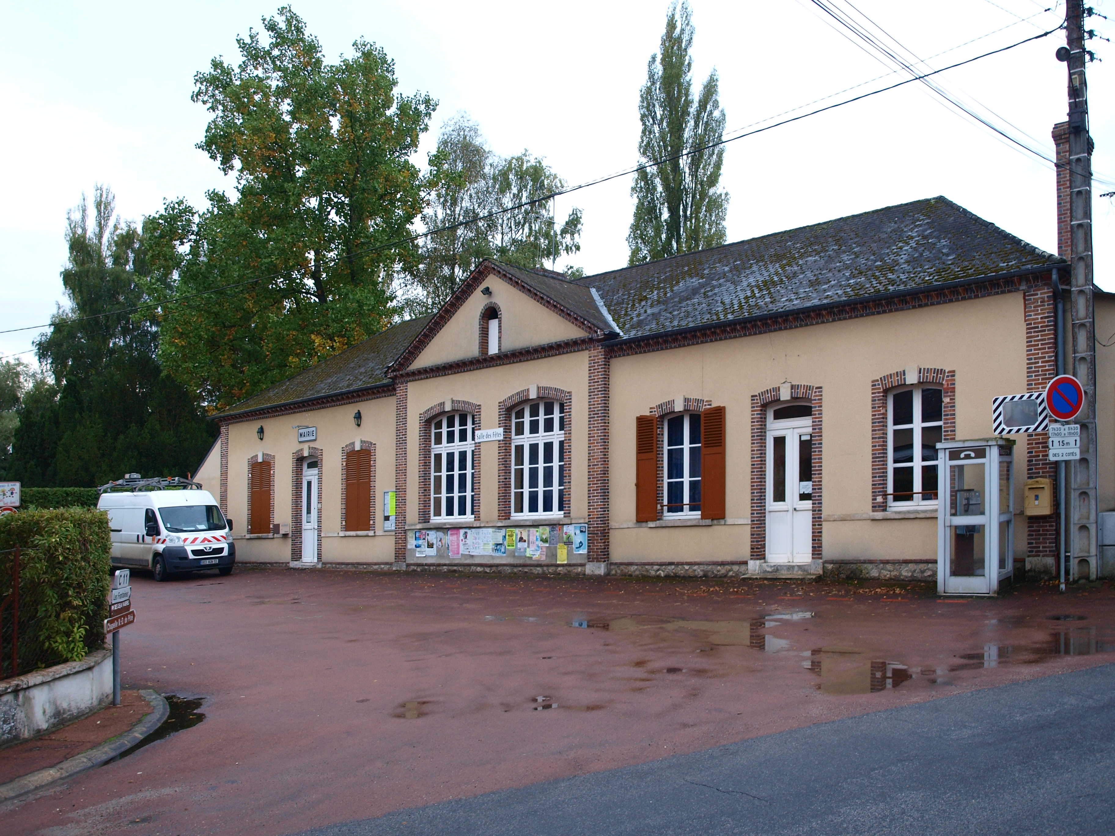 Chevannes (Loiret, France), la mairie & salle des fêtes (le village n'a plus d'école)